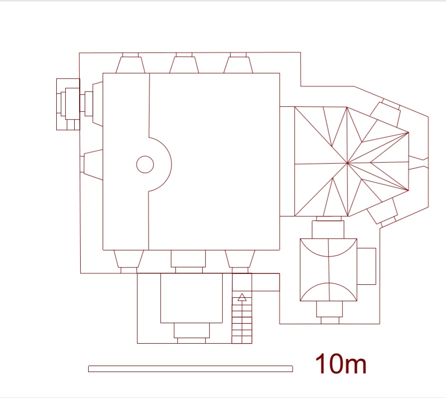 Půdorys kostela sv. Palmácia